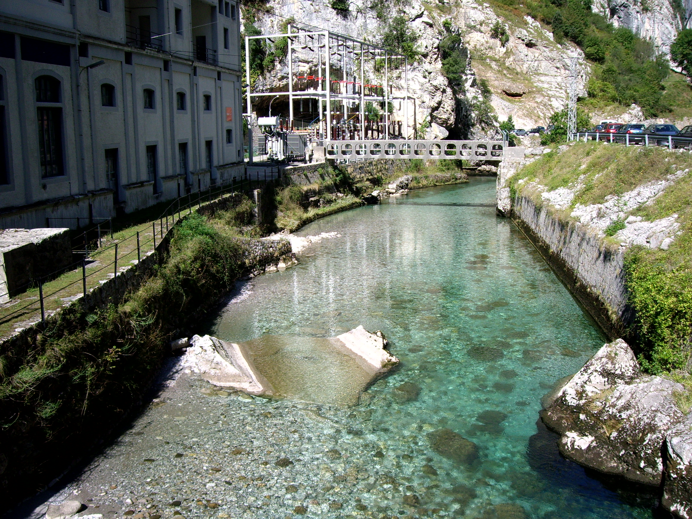 Central Hidroelectrica Bulnes (Cabrales)